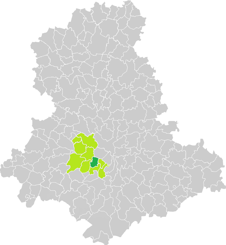 Carte de situation de la commune de Beynac (en vert foncé) dans le votre Canton (en vert clair) sur une carte des communes de la Haute-Vienne